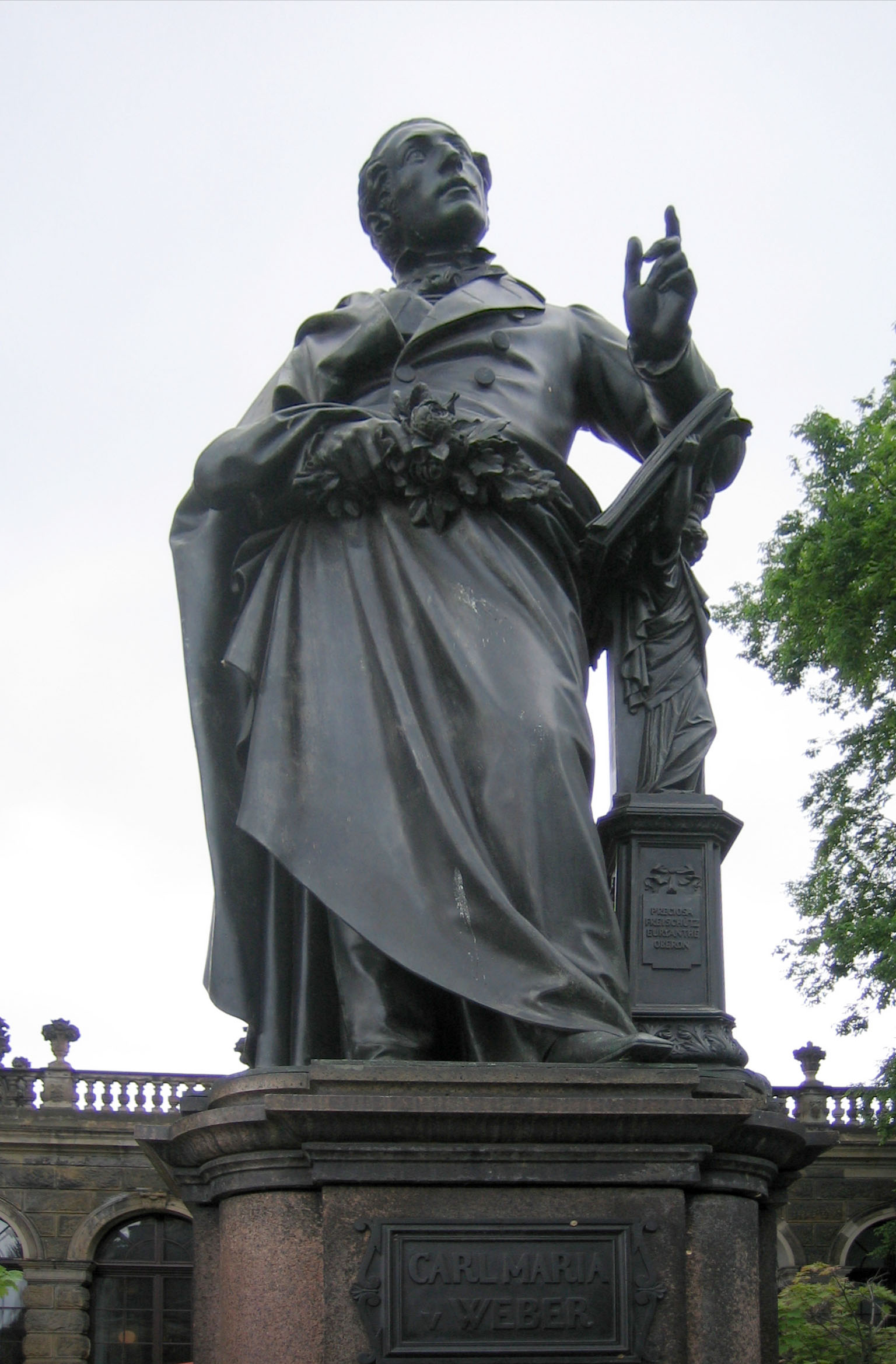 Statue von Carl Maria von Weber vor der Sempergalerie am Theaterplatz in Dresden